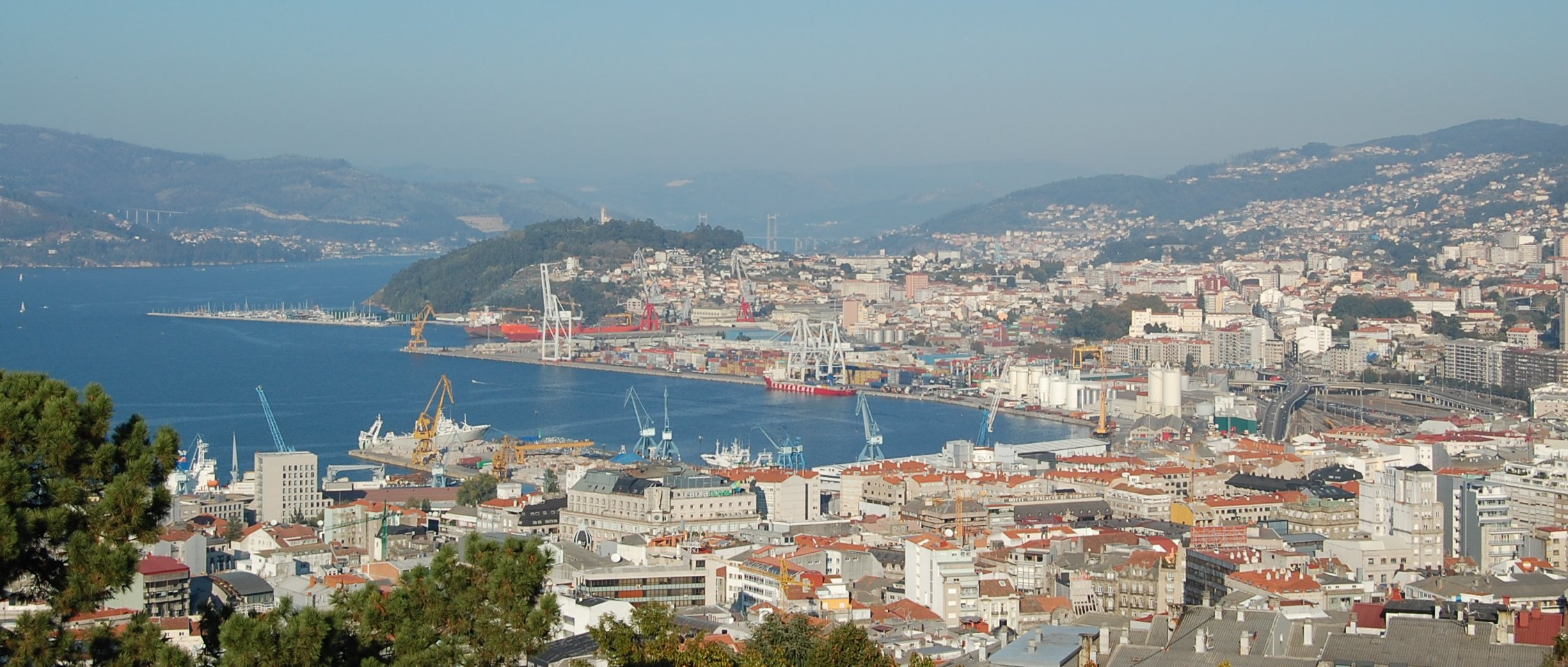 A área central e portuária de Vigo.